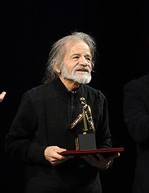 جلال ذوالفنون در اختتامیه بیست و هفتمین جشنواره موسیقی فجر - ۱ اسفند ۱۳۹۰